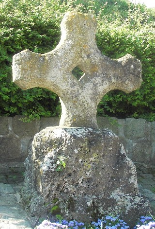 Croix en tuf existant à Frettemeule